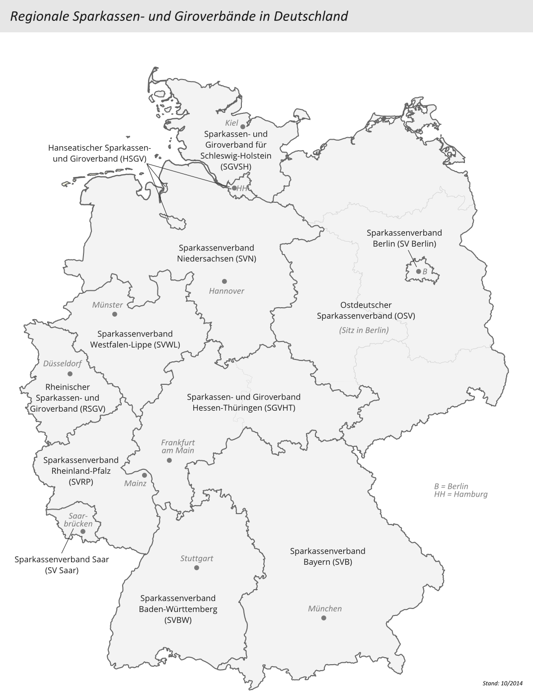 Deutscher Sparkassen- und Giroverband: Übersicht über die regionalen Sparkassen- und Giroverbände. Kartengrundlage basiert auf der Datei: (Autor: NordNordWest)